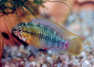 Umbrella cichlid, Apistogramma hongsloi